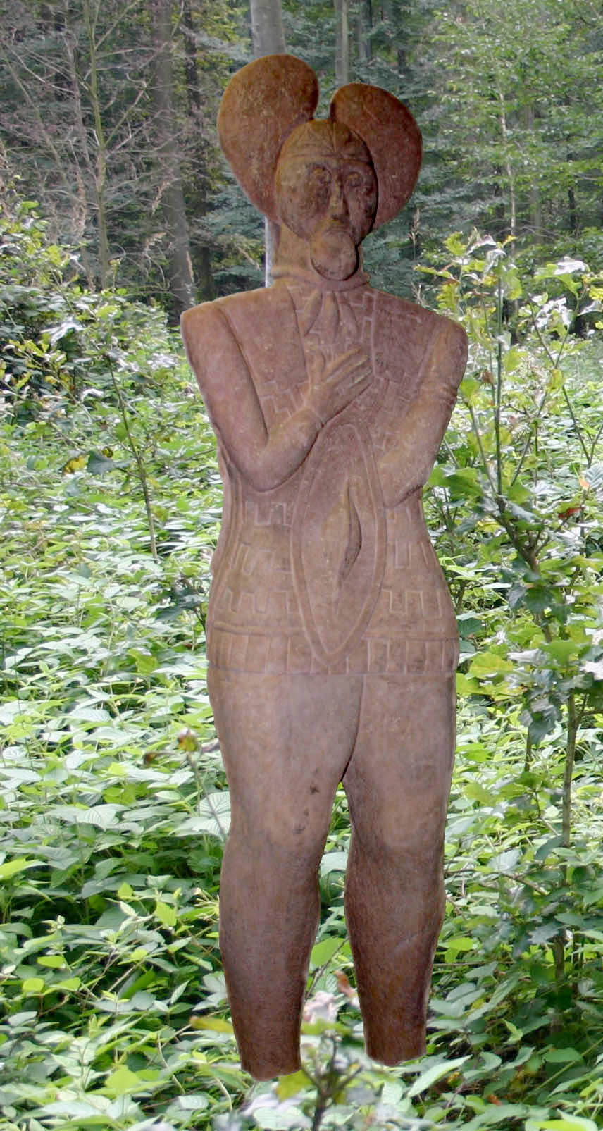 Beschreibung: Der Keltenfürst vom Glauberg, Deutschland (Fotomontage) Ursprung: Selbst fotografiert von Sven Teschke am 7. Januar 2005 Lizenzstatus: GNU FDL Also seedetail at Image:Keltenfürst Glauberg Gesicht.jpg